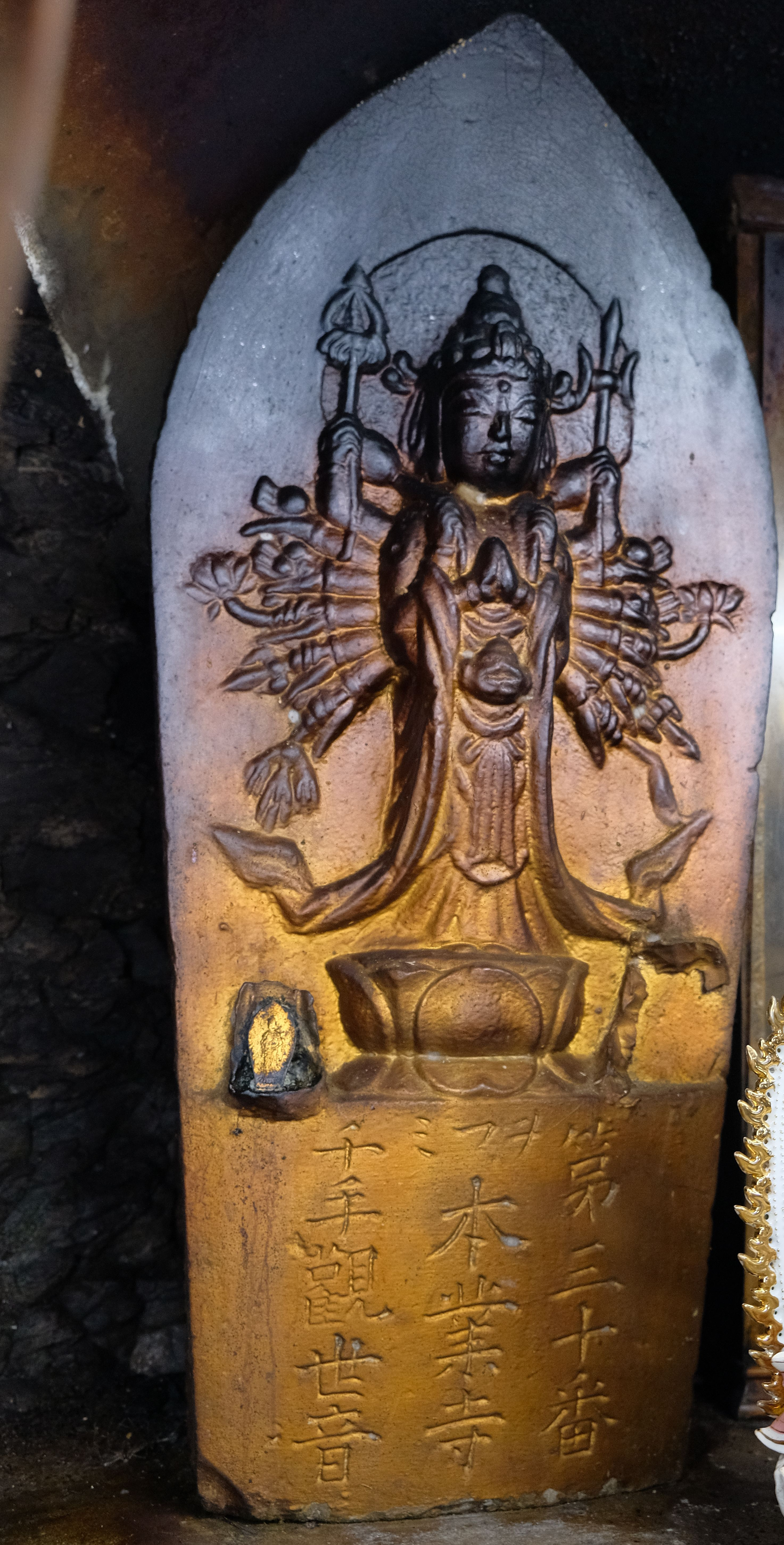 2018 TouCheng ShiGuanYin Temple 頭城石觀音寺 宜蘭西國三十三所觀音靈場第三十番千手觀世音